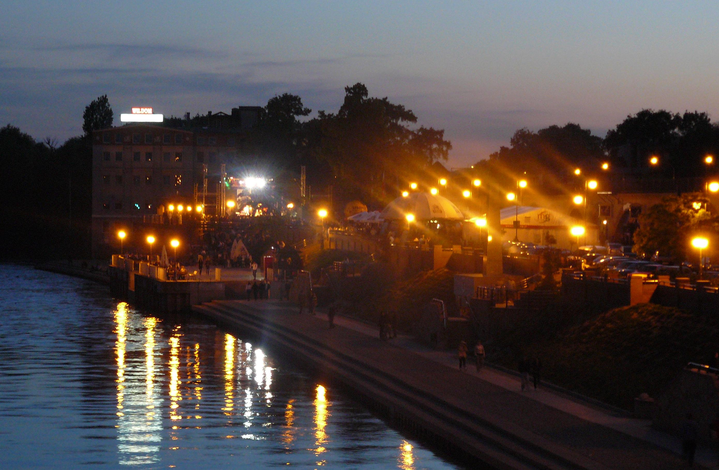 Gorzów Wielkopolski - bulwar nocą